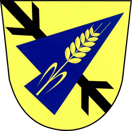 znak, Láz, okres Třebíč